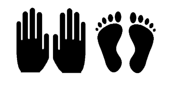 وکتور